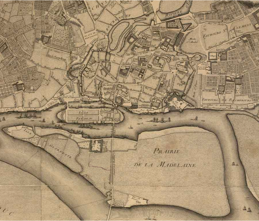 Plan de la ville de Nantes et de ses fauxbourgs levé par ordre de MM. les maire, échevins et procureur du roy sindic de ladite ville, levé par F. Cacault en 1756 et 1757, gravé par J. Lattré, en 1759.